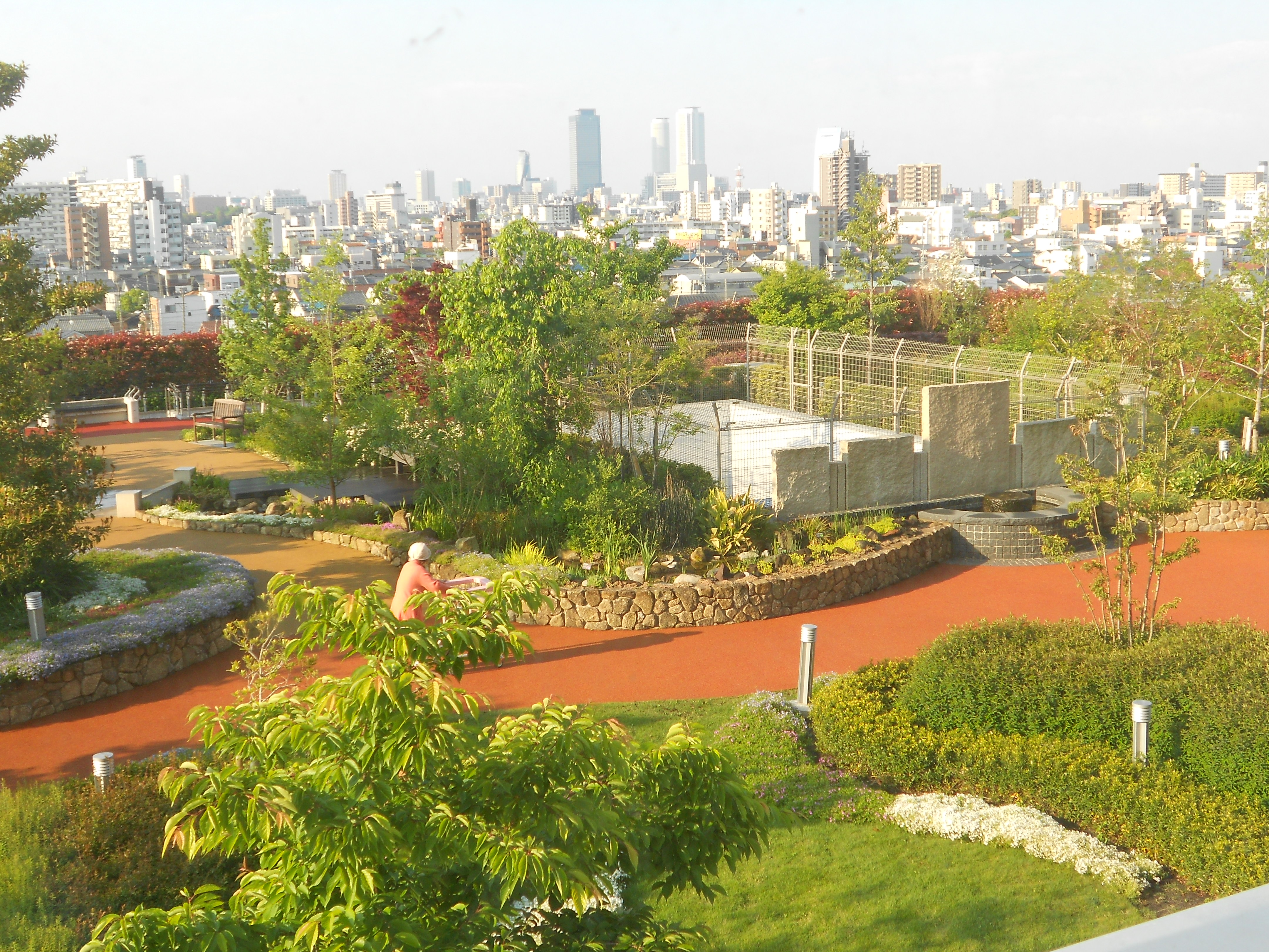 名古屋市立西部医療センターひだまりの丘